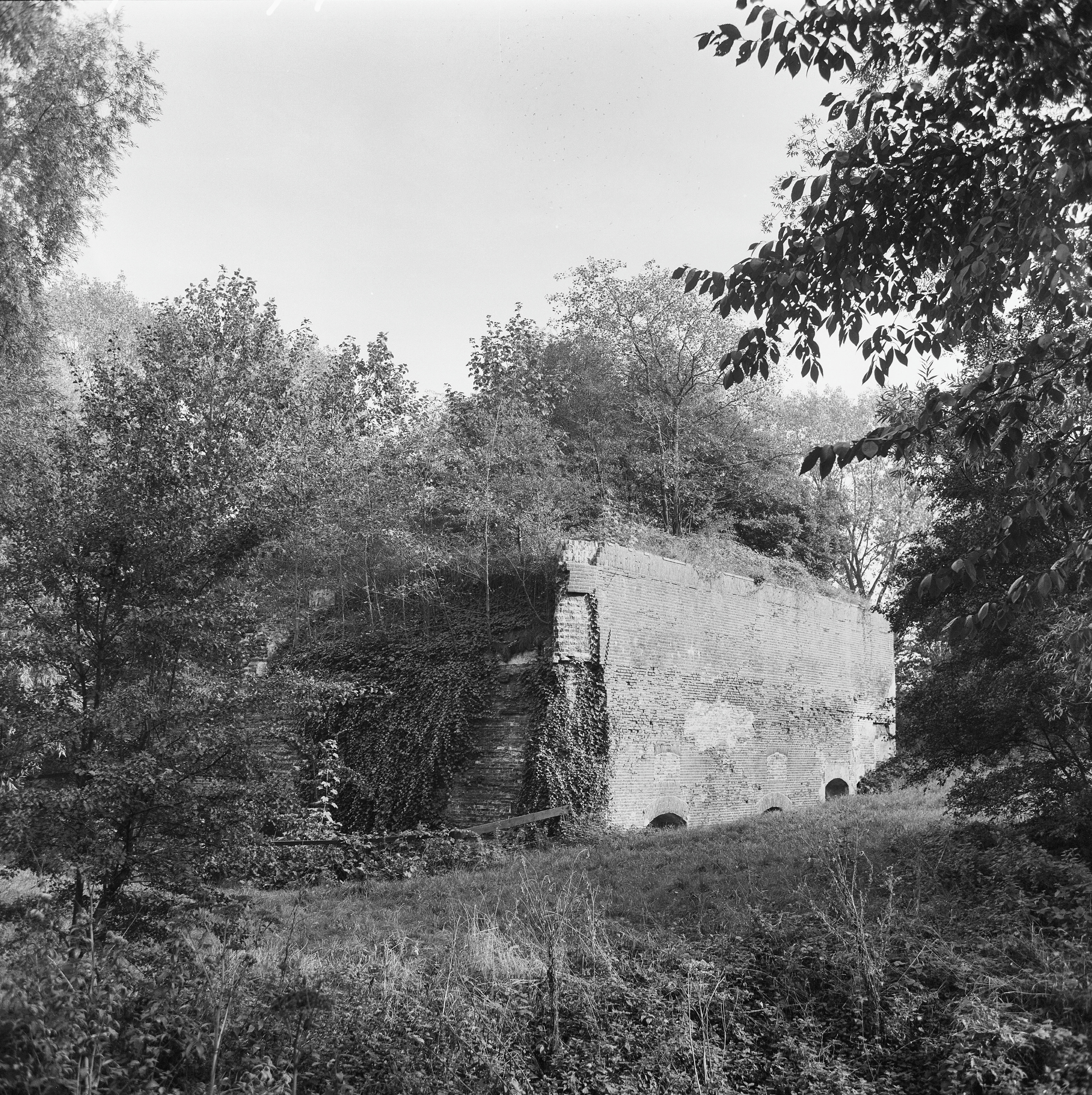 fort Hinderdam This is a possible Rijksmonument: Find the monument in the Monuments database: in Nederhorst den Berg All Rijksmonumenten in Nederhorst den Berg Is this a Rijksmonument? Yes No More information about this project and help. More images to work at in Category:Possible Rijksmonumenten.